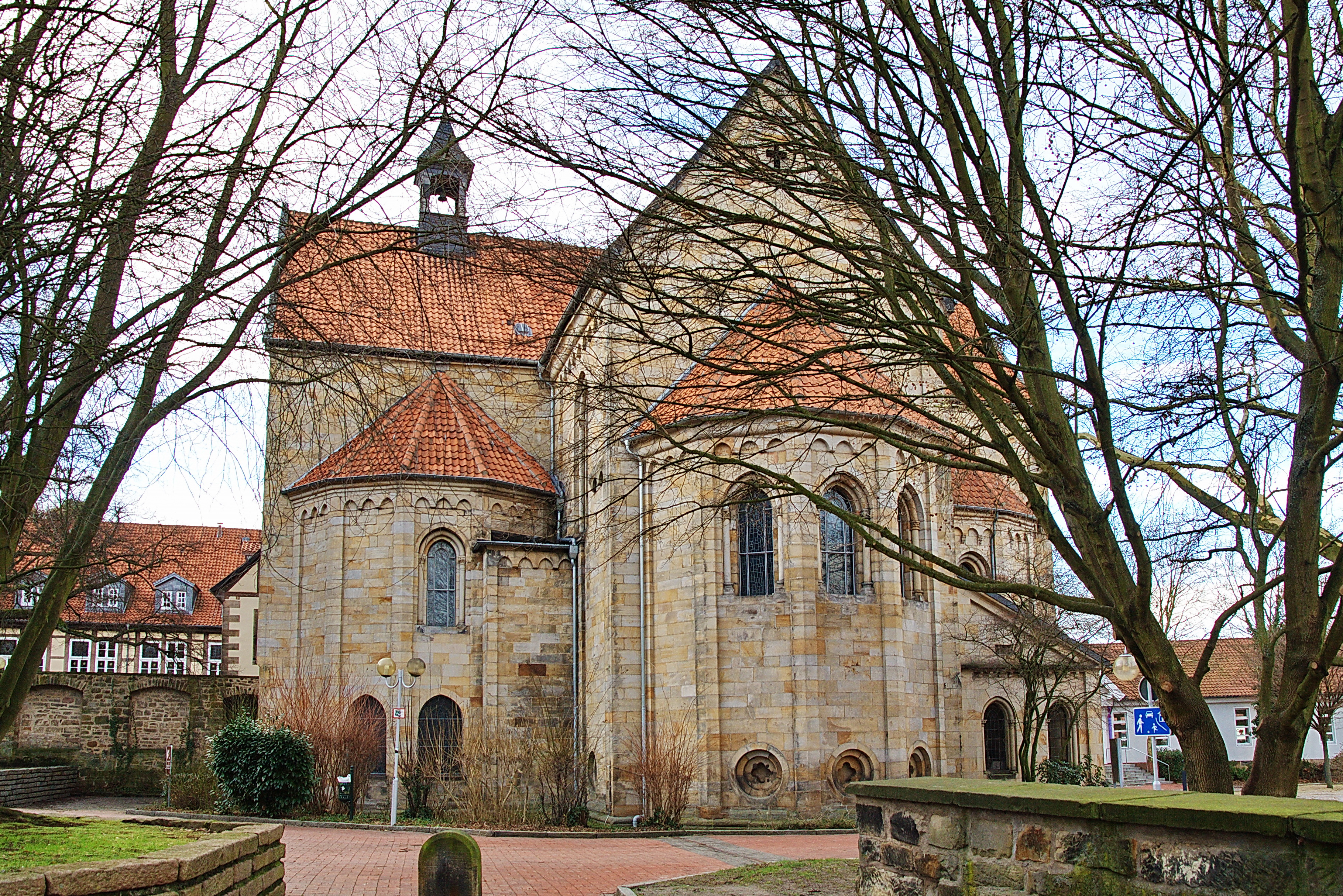 Klosterkirche Barsinghausen, Niedersachsen, Deutschland